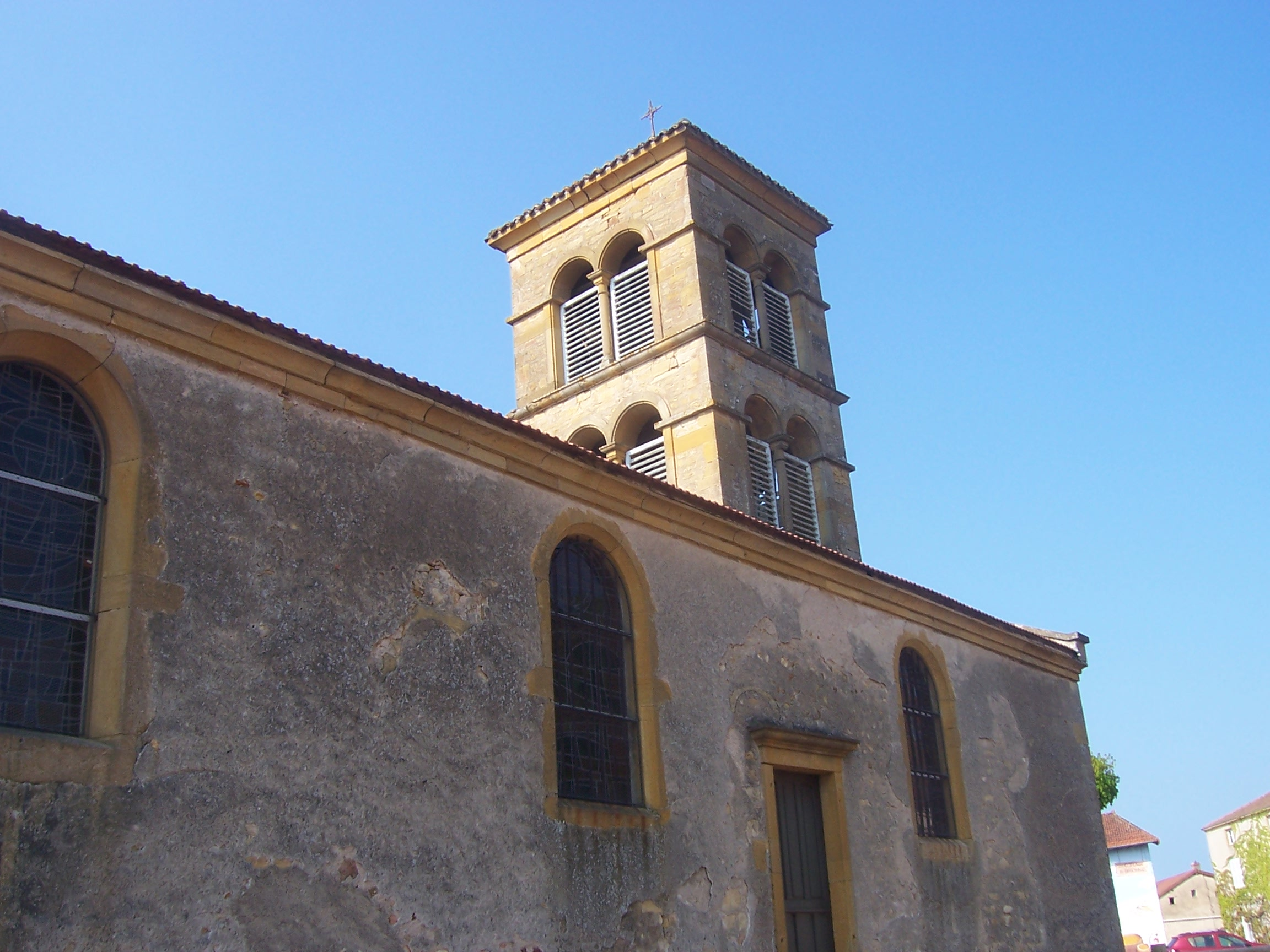 Eglise de Mailly